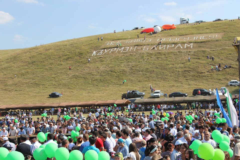 Праздник Гьид-аль-Адха (Курбан-Байрам) в села Псыгансу